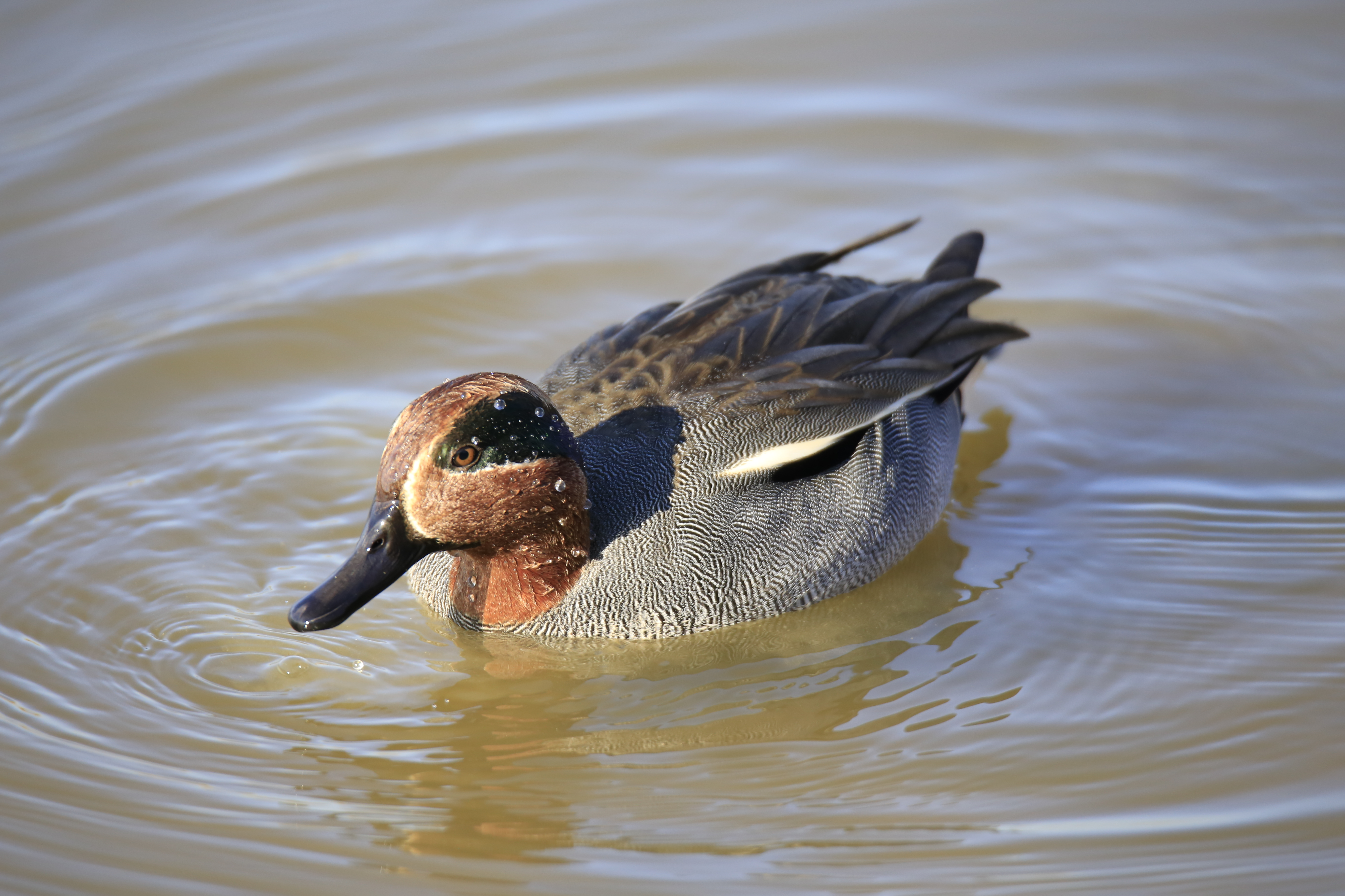 Alzavola (Anas crecca)